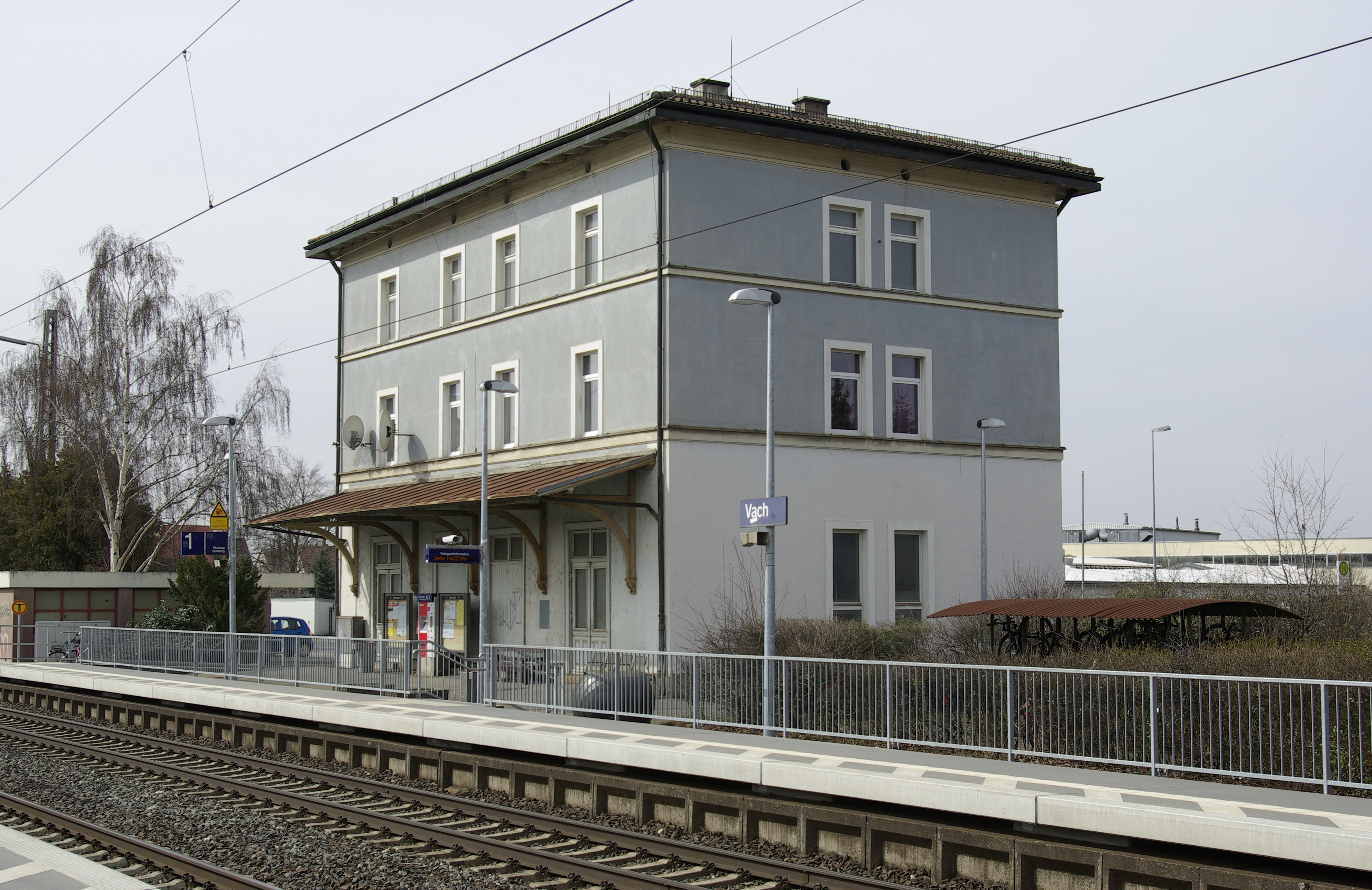 Bahnhof Vach im Fürther Stadtteil Stadeln.